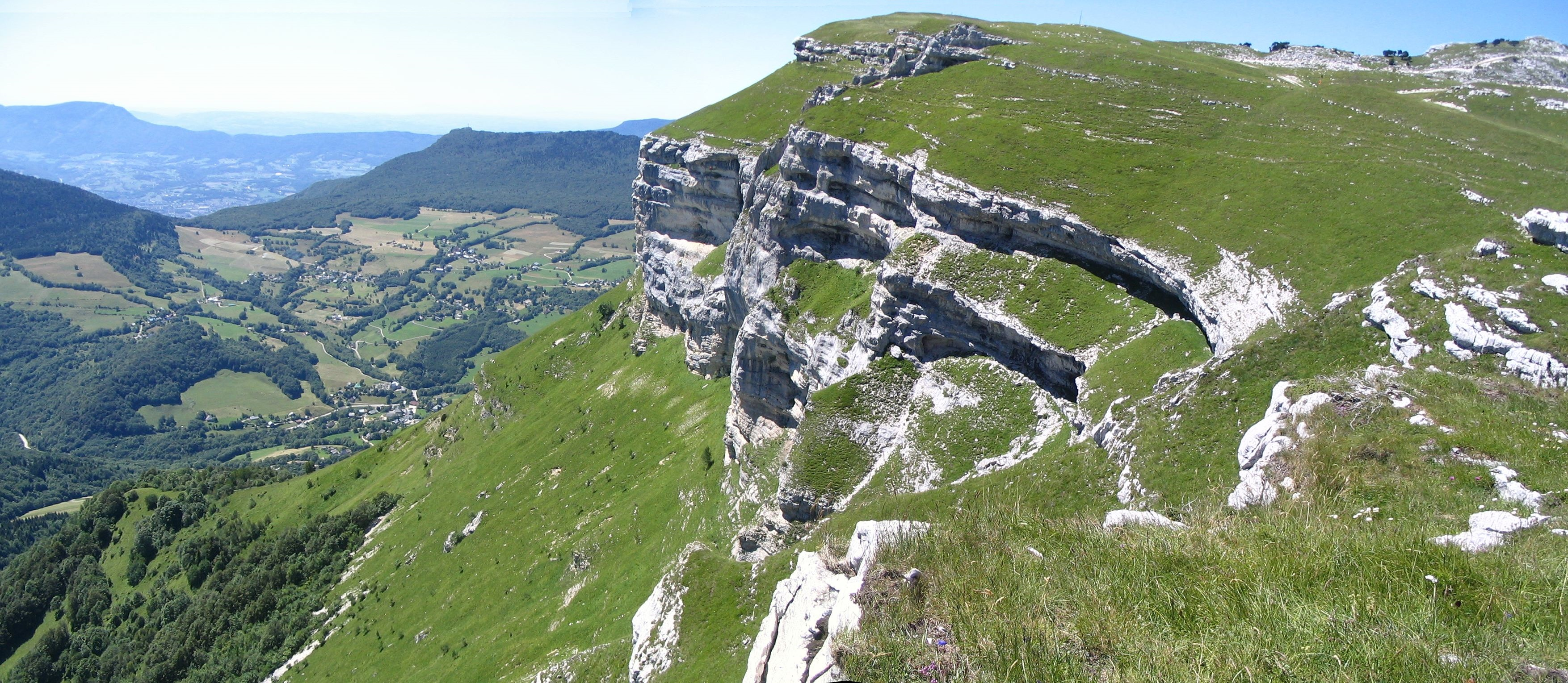 Roc de Margeriaz 1845 m